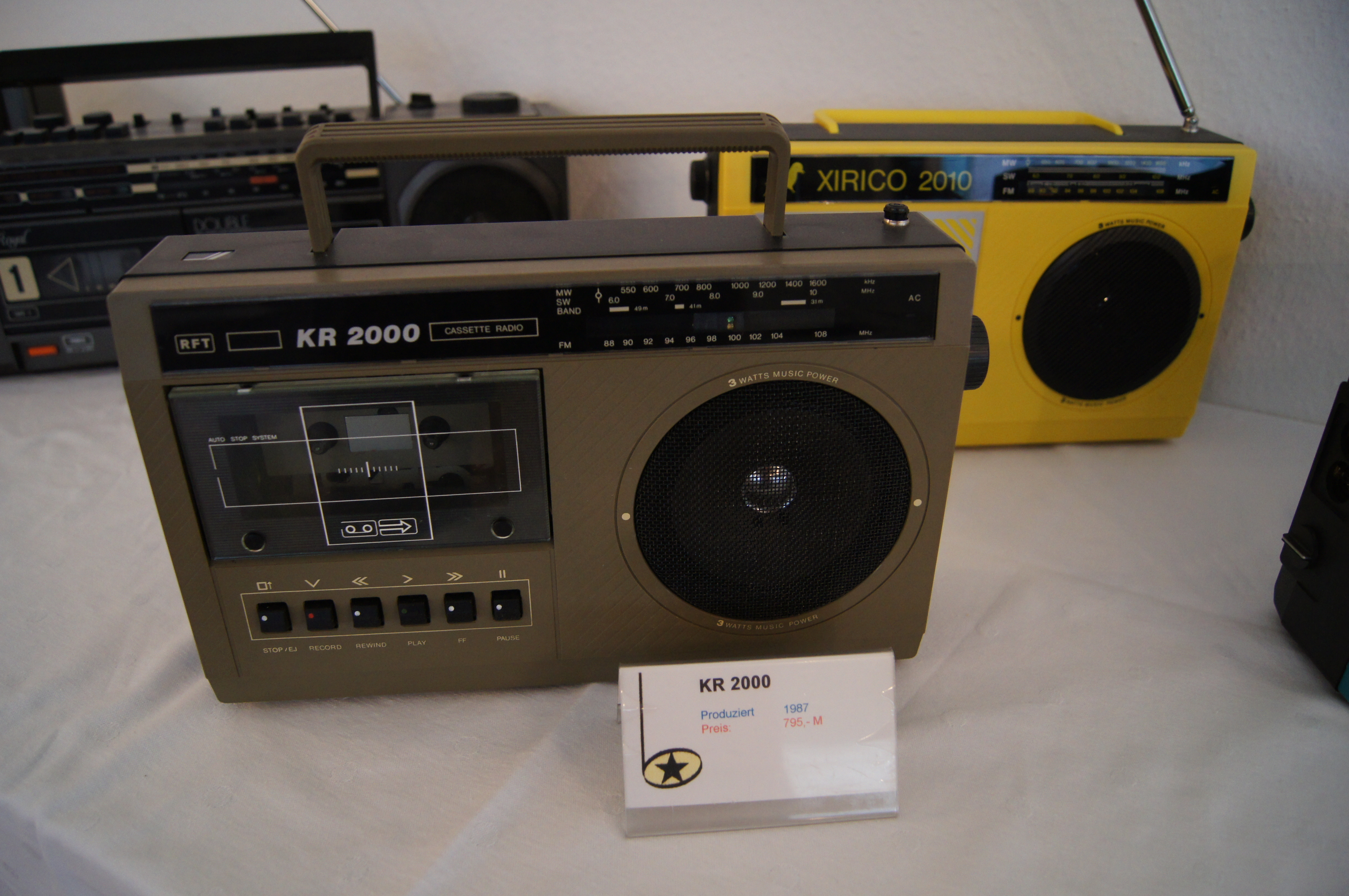 Kombinat VEB Stern-Radio KR 2000 Produziert 1987 Preis 795,-M